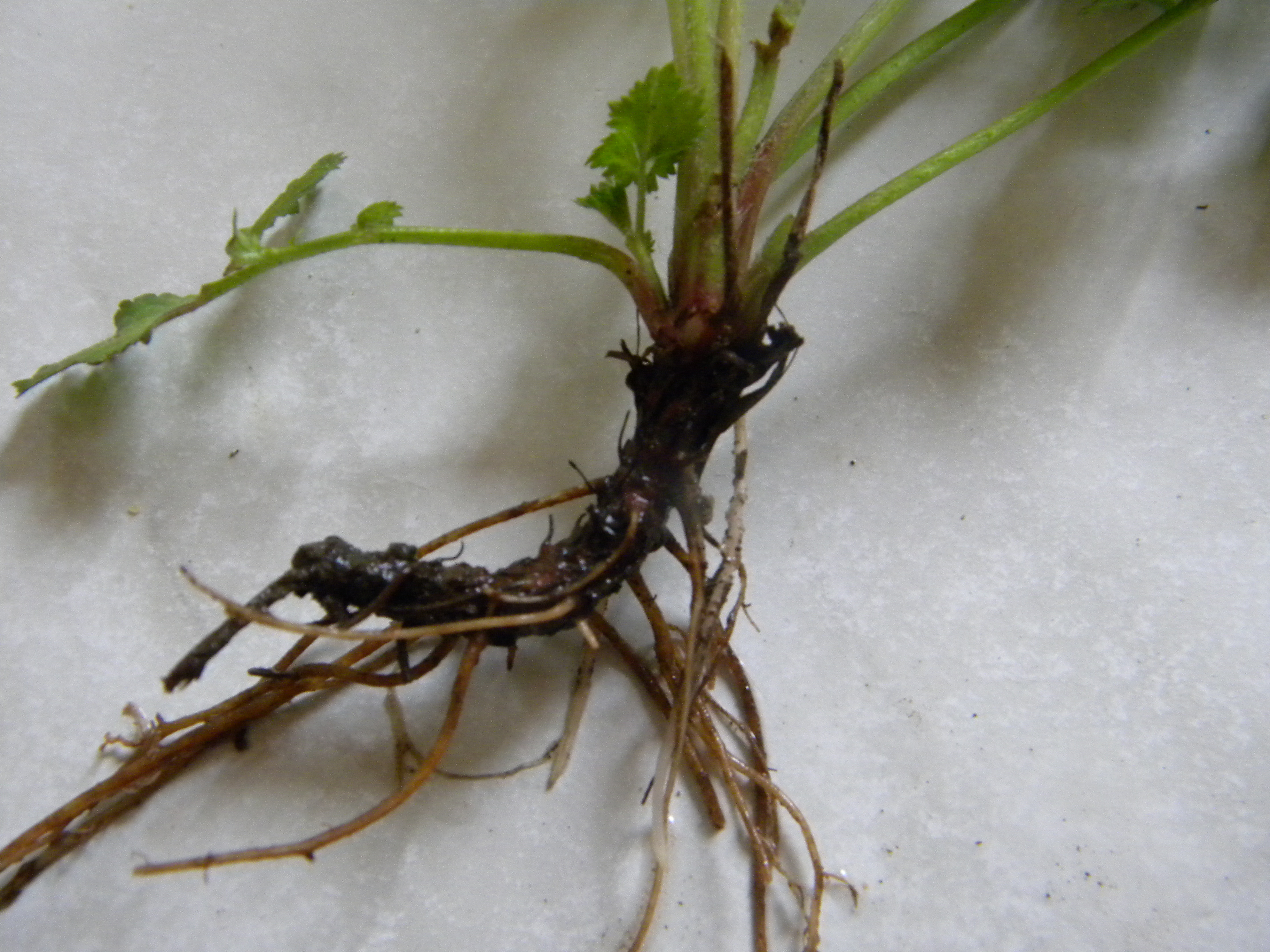 Rizomo de Geum urbanum